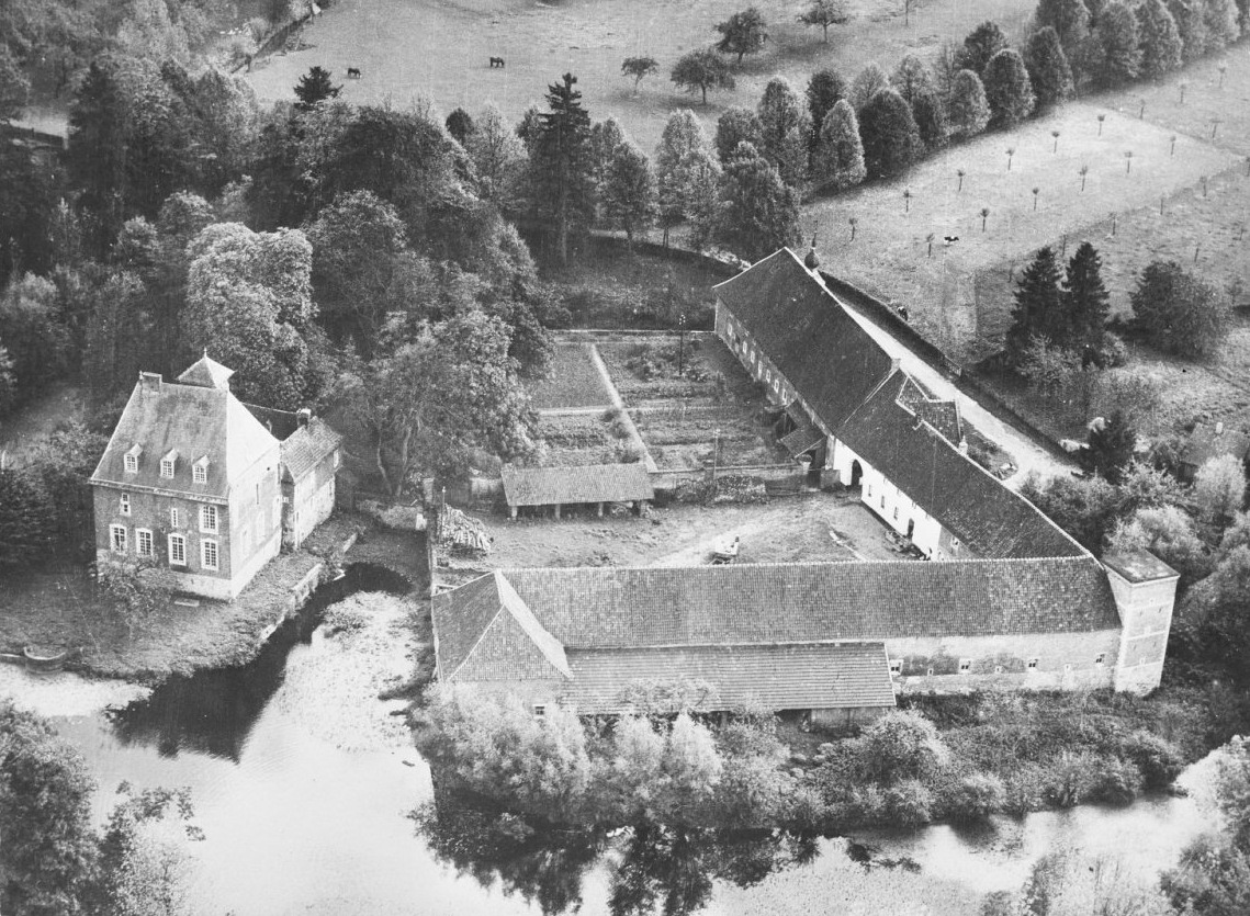 Luftbild des Schlosses Lemiers in Vaals